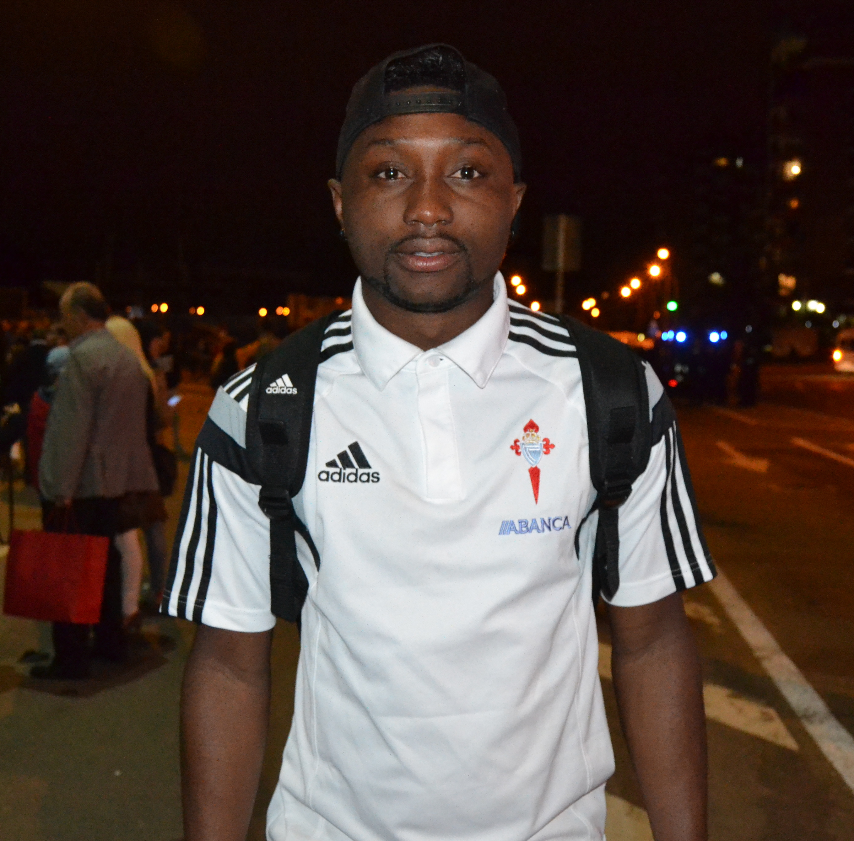 O futbolista Lévy Madinda